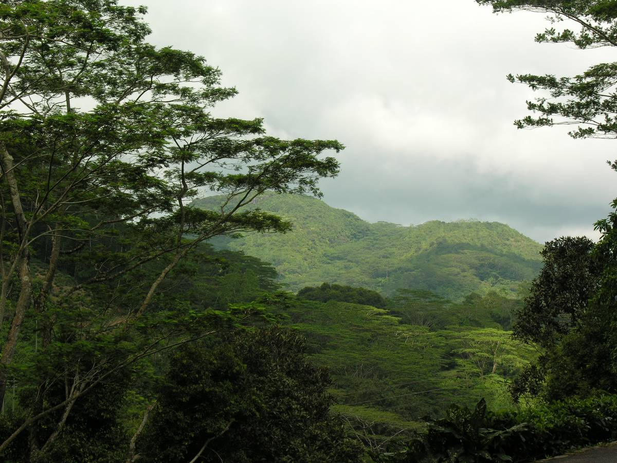 Seychelles, Mahé Island